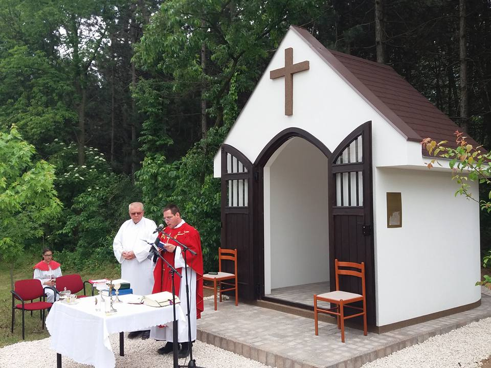 2017-ben az egykori újhartyáni szőlők területén újjáépült az 1970-es években elbontott Szent Orbán kápolna.